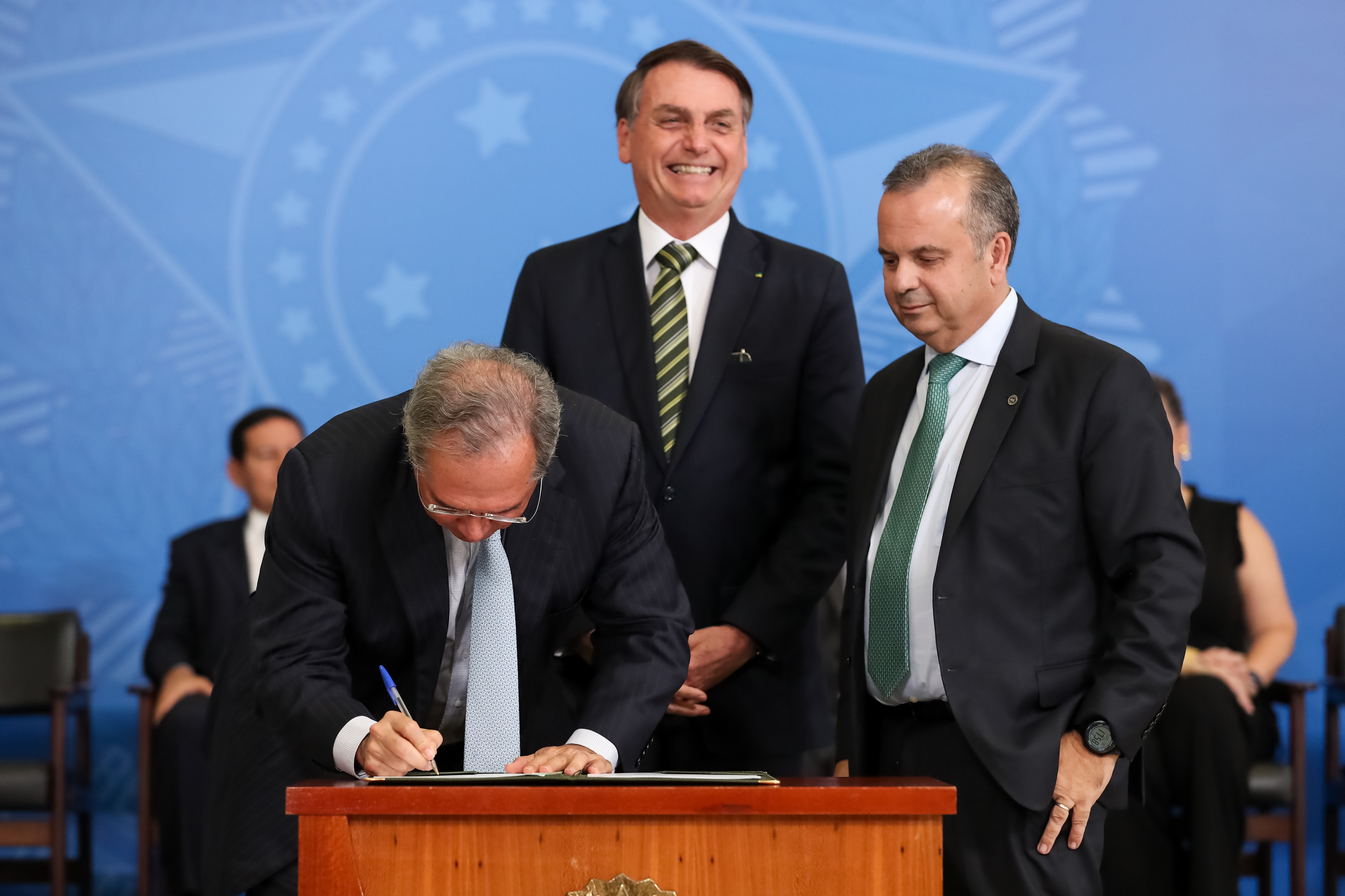 (Brasília - DF, 30/07/2019) Presidente da República, Jair Bolsonaro, Acompanhado do Ministro da Economia, Paulo Guedes, e do Secretário Especial de Previdência e Trabalho, Rogério Marinho, assinam Decreto que dispõe sobre o Conselho Nacional do Trabalho e Institui a Comissão Tripartite Paritária Permanente. Foto: Marcos Corrêa/PR